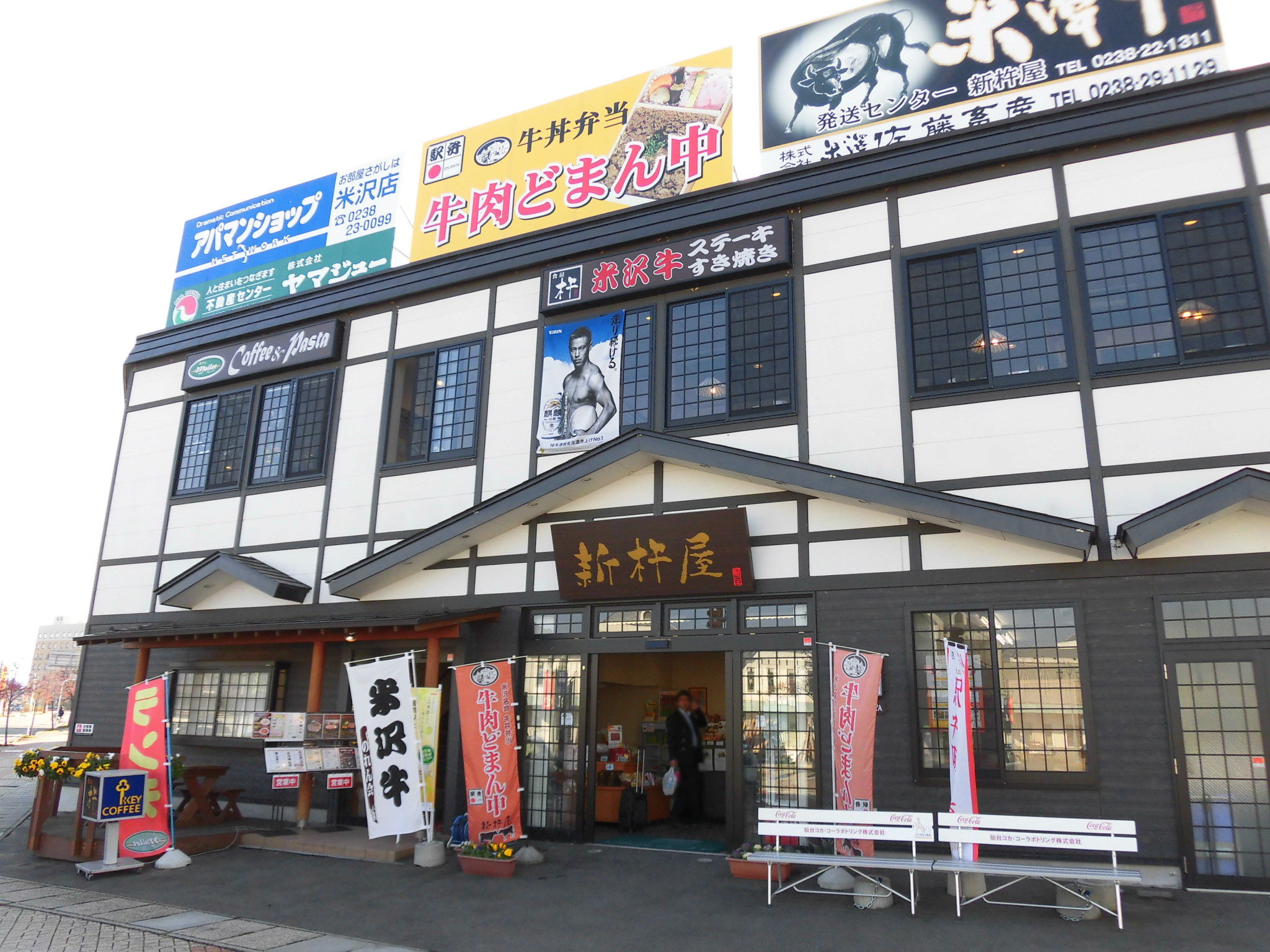 新杵屋（しんきねや）。山形県山形市。弁当（駅弁）の製造販売。